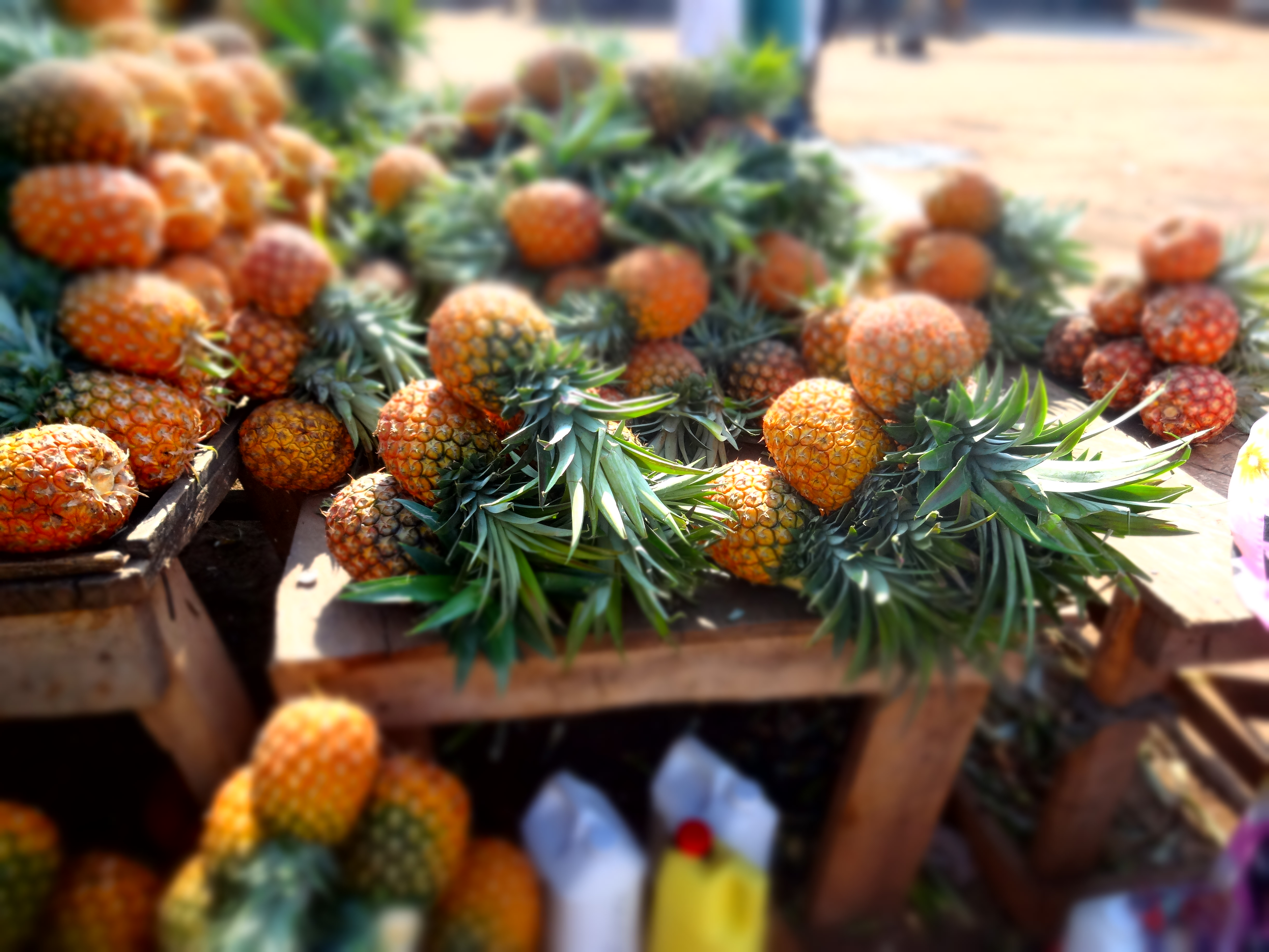 אננסים טריים בשוק הכפרי